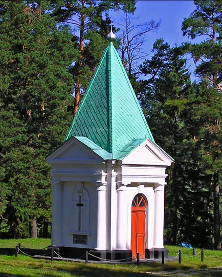 Παρρεκλήσι στη Σαλτάνοφκα